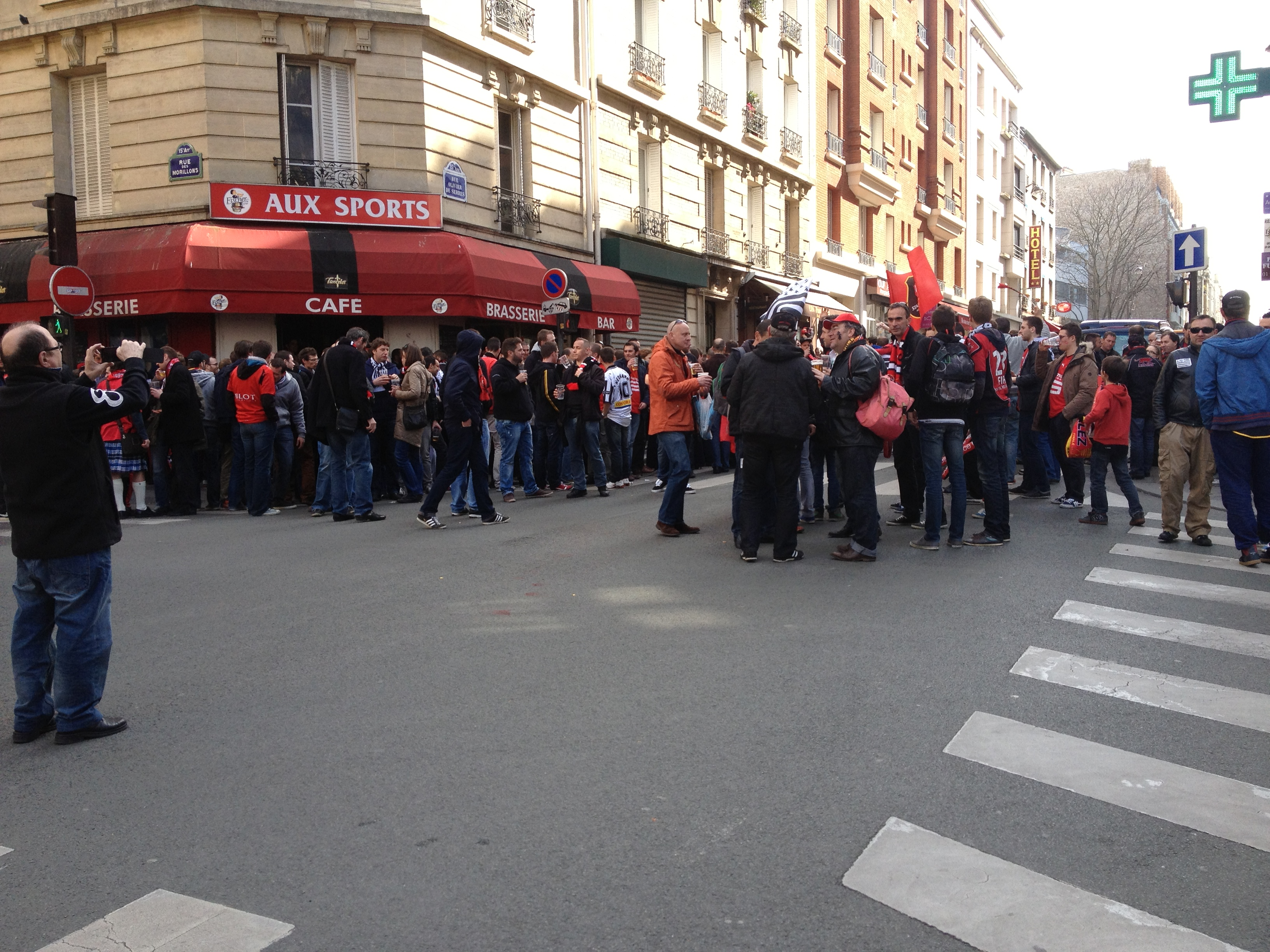 Supporters du Stade rennais FC devant un bar parisien du quartier Montparnasse, quelques heures avant la finale de la Coupe de la Ligue 2013